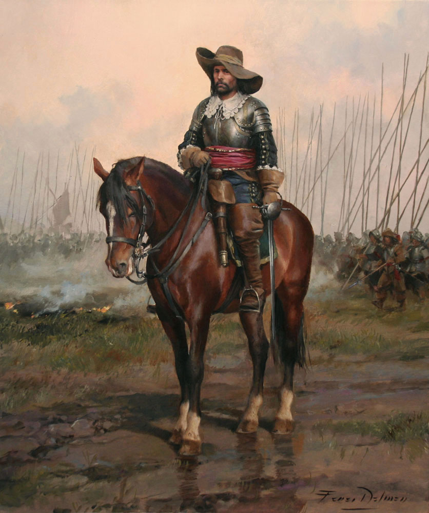 Caballeria Valona Guerra de los 30 años